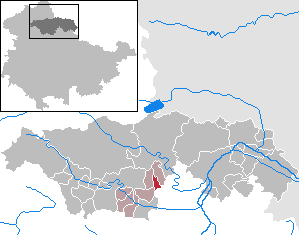 Niederbösa in Thuringia - Kyffhäuserkreis